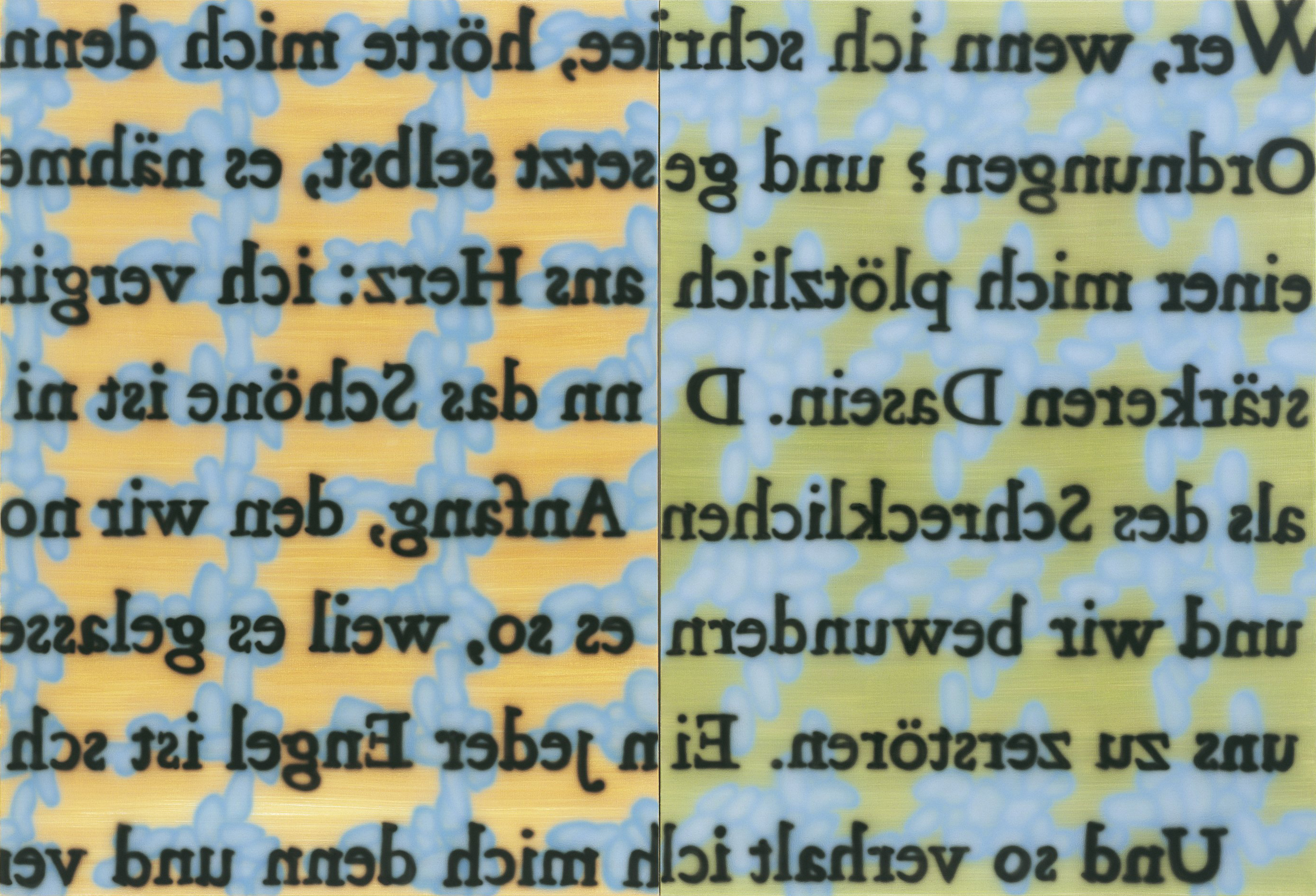 Keining - Rilke, 185 x 270 cm (2-teilig), Kunstharz auf Leinwand, 2006, Copyright Norbert Faehling und Horst Keining, 2013.